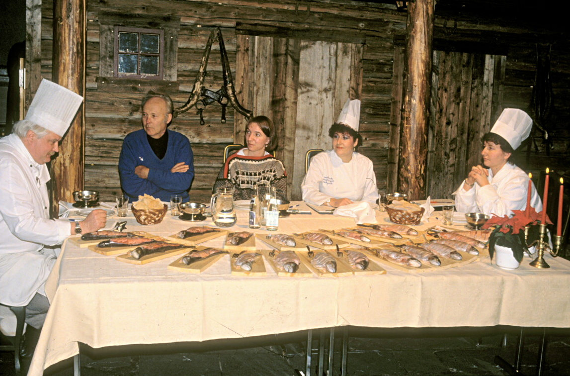 Årets Rakørret 1990 (starten på Norsk Rakfiskfestival). Dommerpanelet vurderer rakørret fra 21 ulike rakfiskprodusenter Personer på bildet: Fra venstre Henrik Thomsen, Edvard Elsrud (død), Tone E. Nyvold, Aud Hansen og Brith Bakken